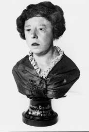 Aus dem Inventar des Wien Museums, Magazin. Restaurierbedürftig, ohne originale Glasabdeckung. Echthaar. Aus einer Wiener Blindenschule stammend.